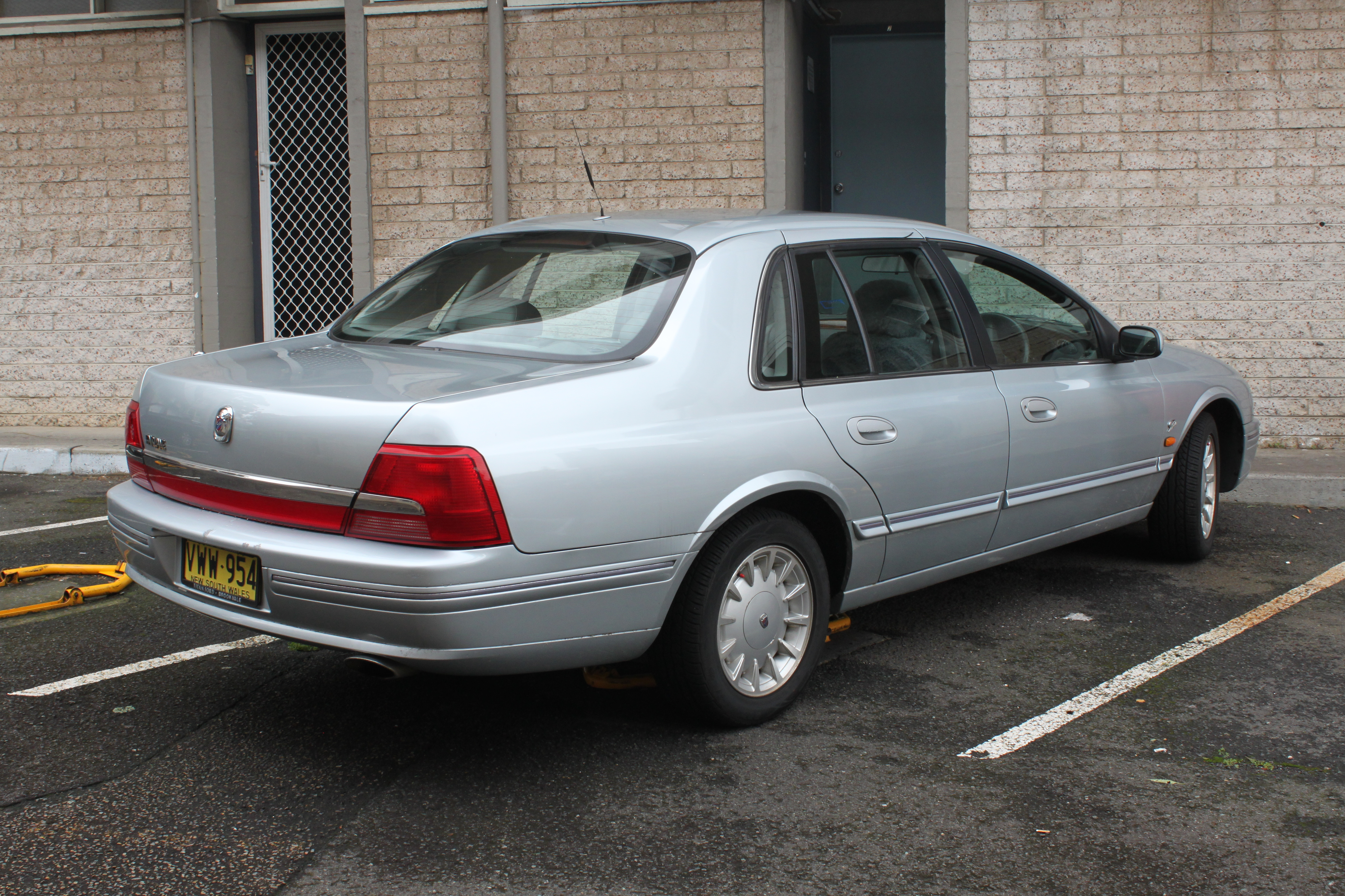 Ford Fairlane AU Ghia